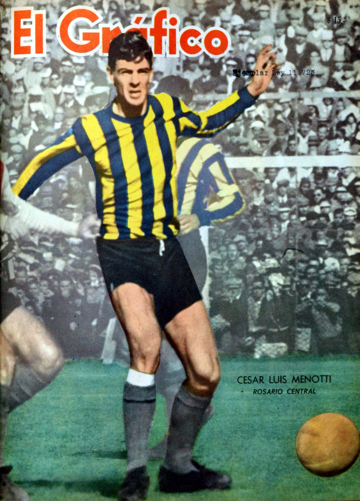 El Grafico del 12 de Septiembre de 1962. Edicion 2240